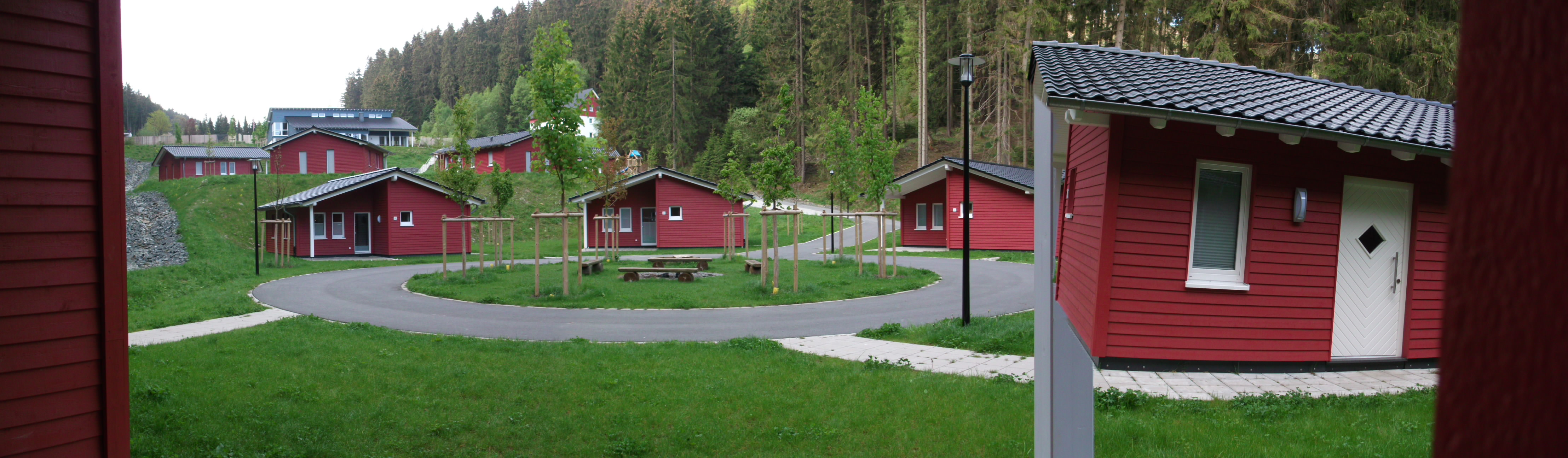 Ein Panoramabild vom Bungalowpark am Haus Aurora, das von den Gästen des Fort Fun Abenteuerland zur Übernachtung genutzt werden kann.